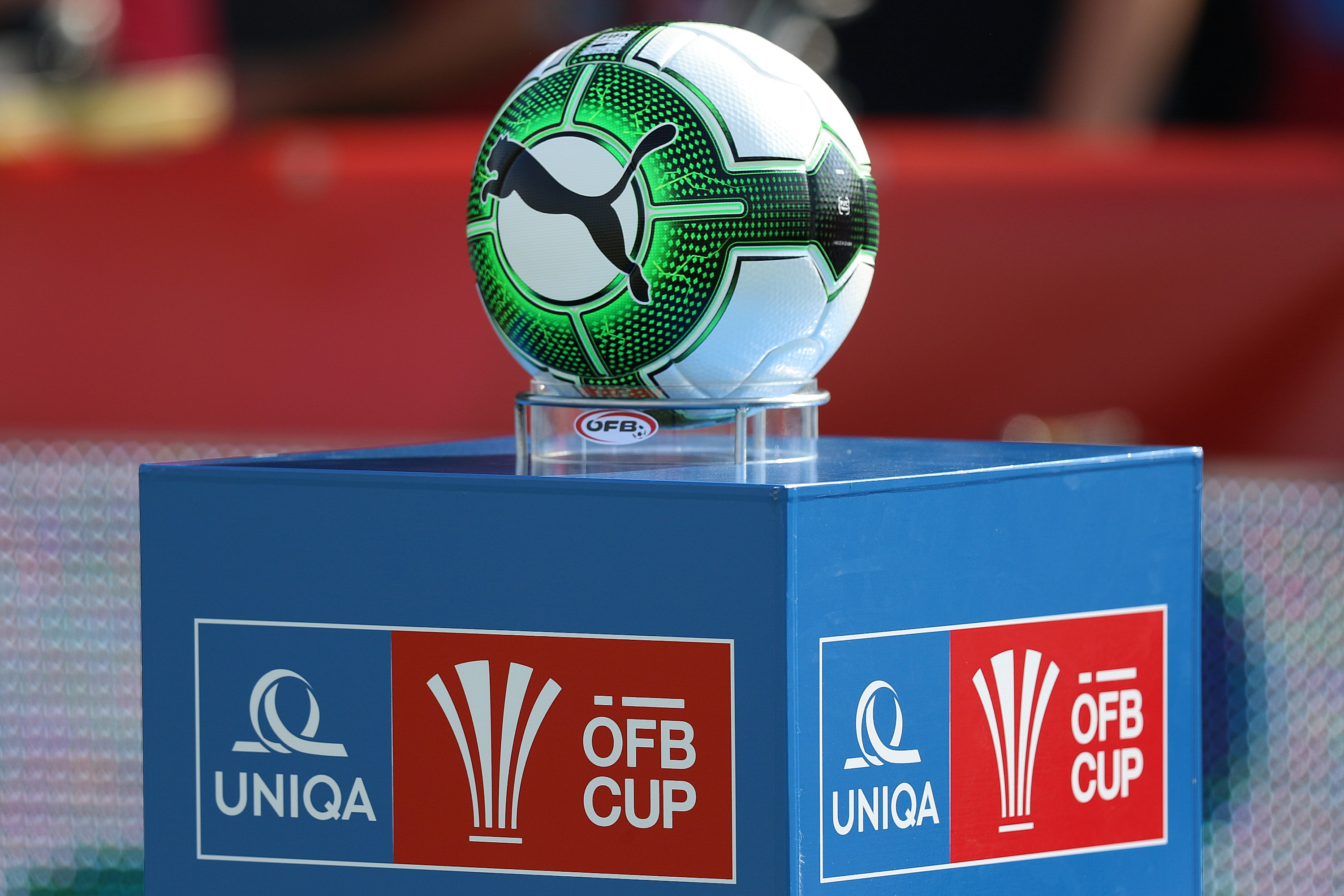 Offizieller Spielball und neues Logo des österreichischen Fußball-Cups seit der Saison 2017/18